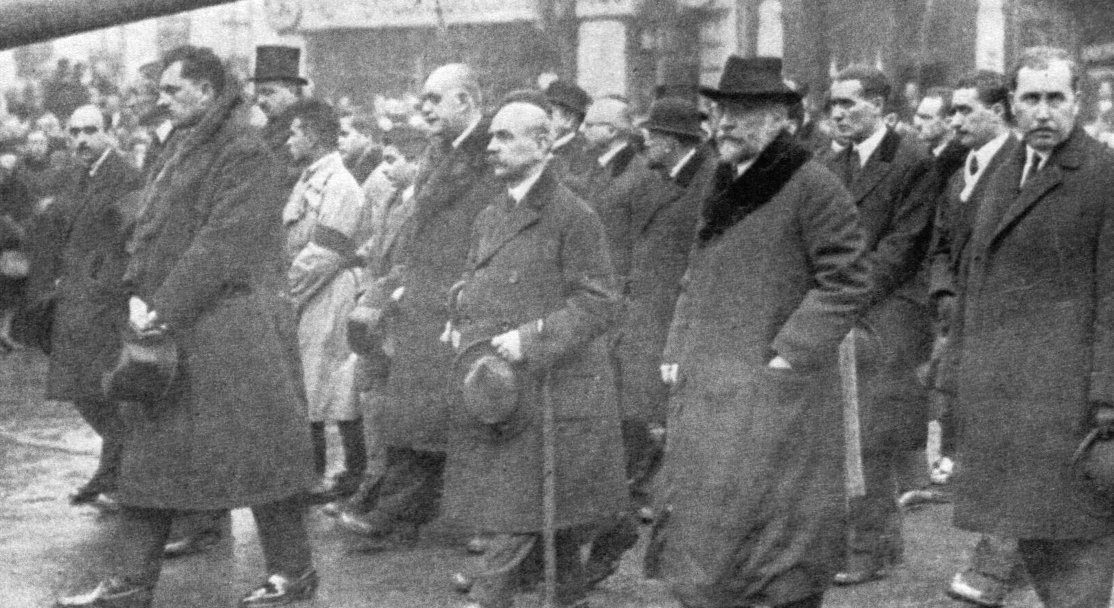 Aspecte de înmormântarea lui Ion I.C. Bratianu, România. În primul rând în prim-plan Gheorghe Brătianu, în rândul 2 în prim-plan Vintilă Brătianu